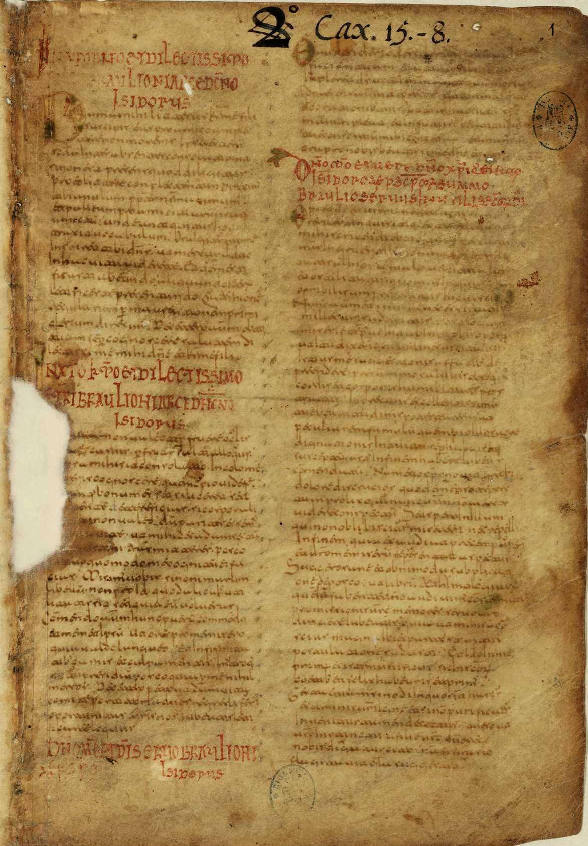 Folio 1r del códice Isidori Etymologiae Codex Toletanus (nunc Matritensis) BNE Vitr. 14-3. Escritura minúscula visigótica (escuela toledanosevillana) 163 folios a dos columnas en pergamino, de 50.52 líneas por página. Procedente de la Catedral de Toledo.